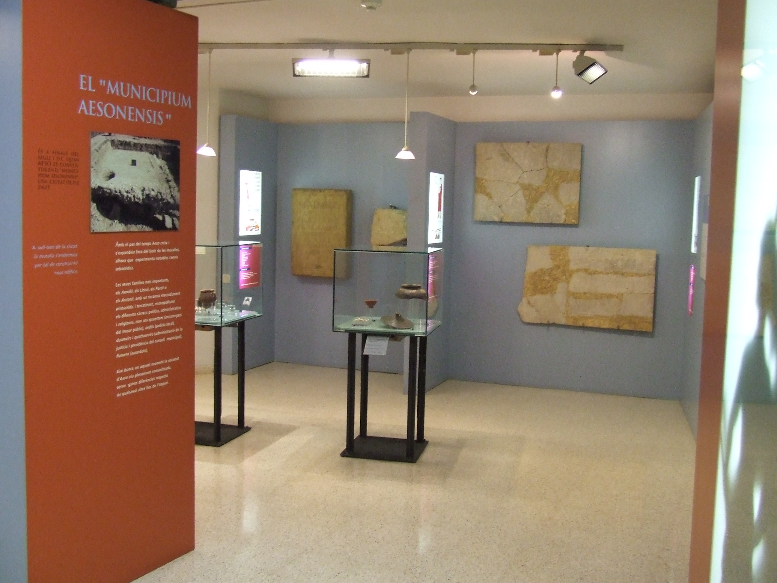 Museu de Conca Dellà (Isona, Pallars Jussà)